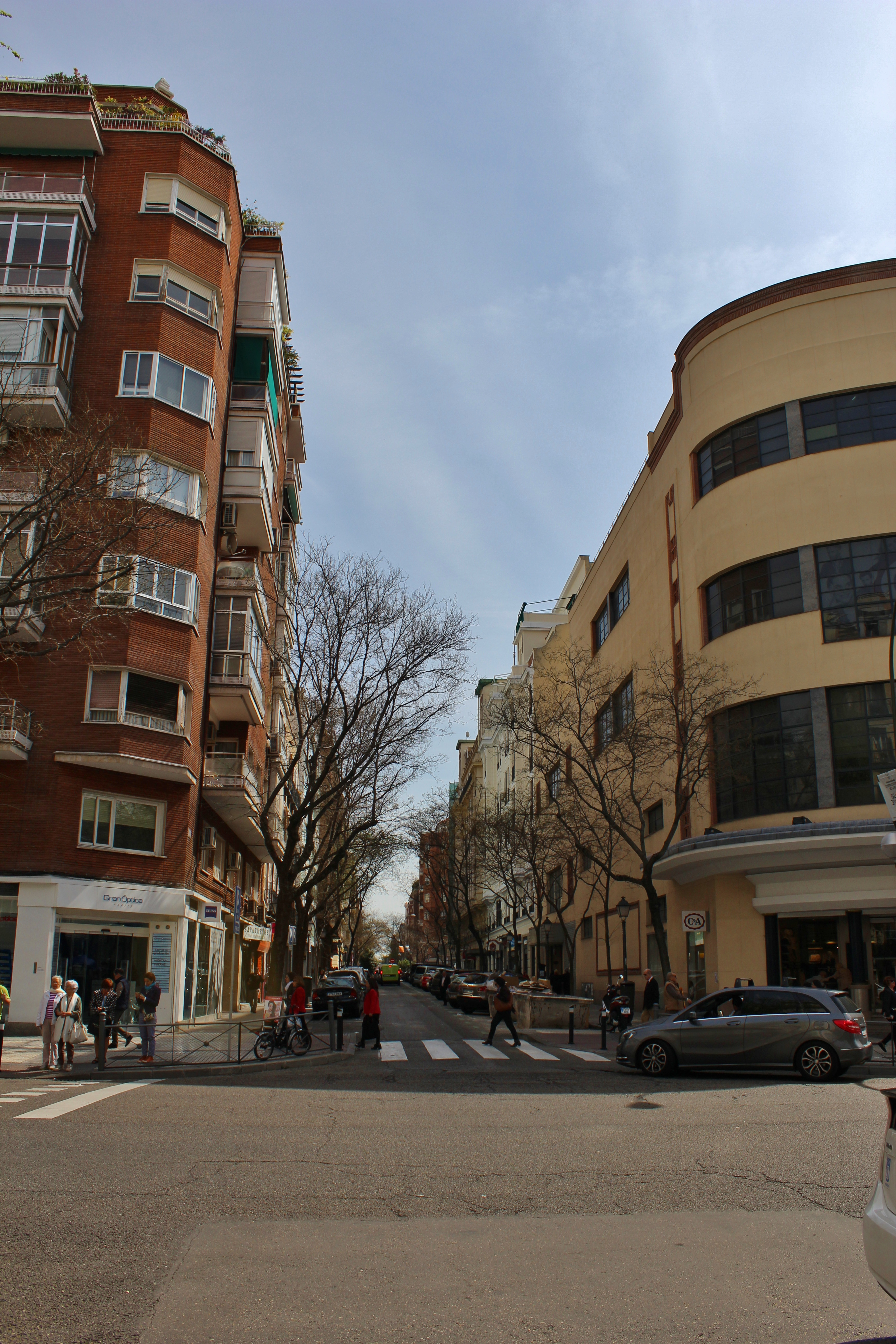 Calle de Hermosilla, Madrid.